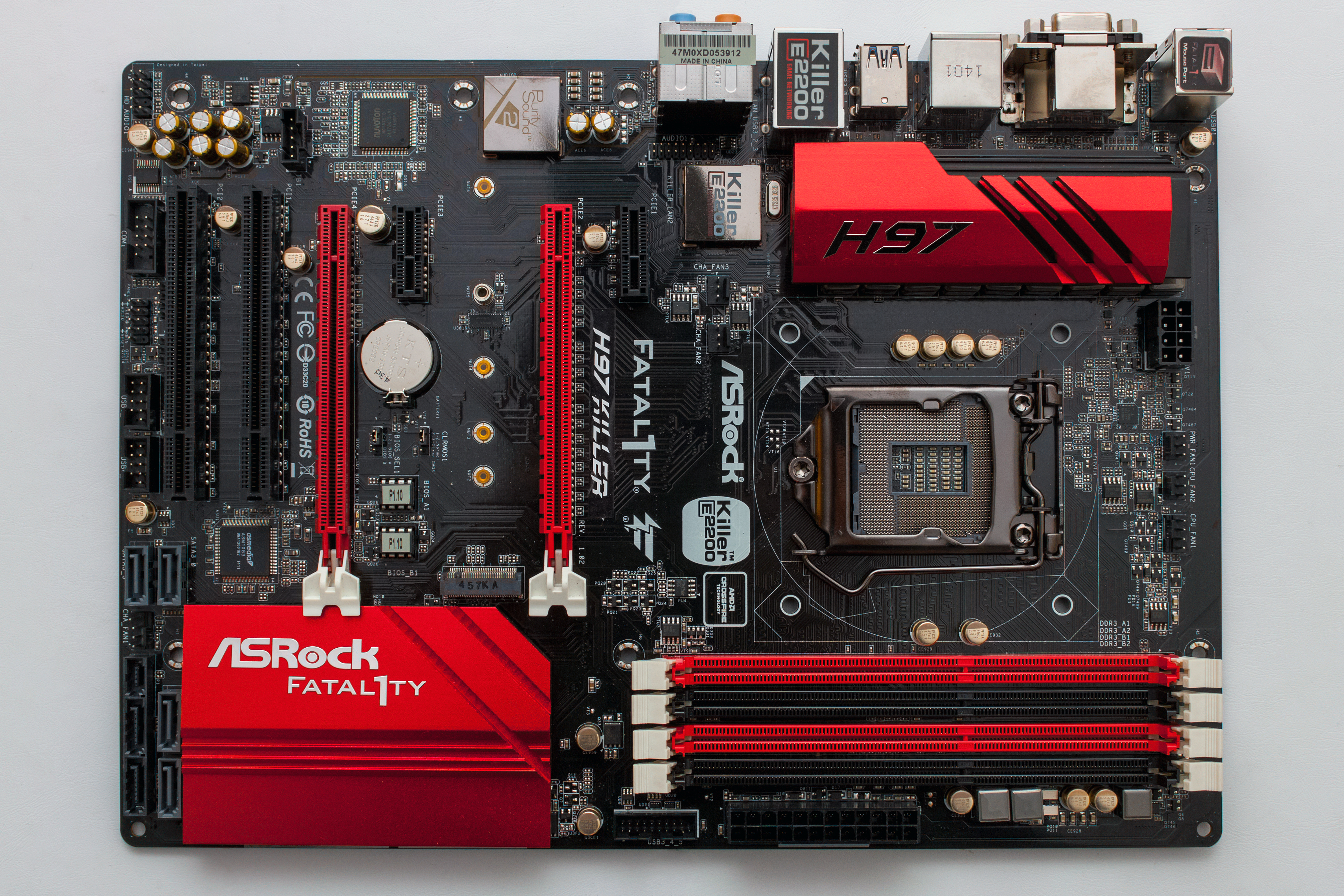 AsRock Fatal1ty H97 Killer, eine Hauptplatine (Mainboard) für den Intel-Sockel LGA 1150.